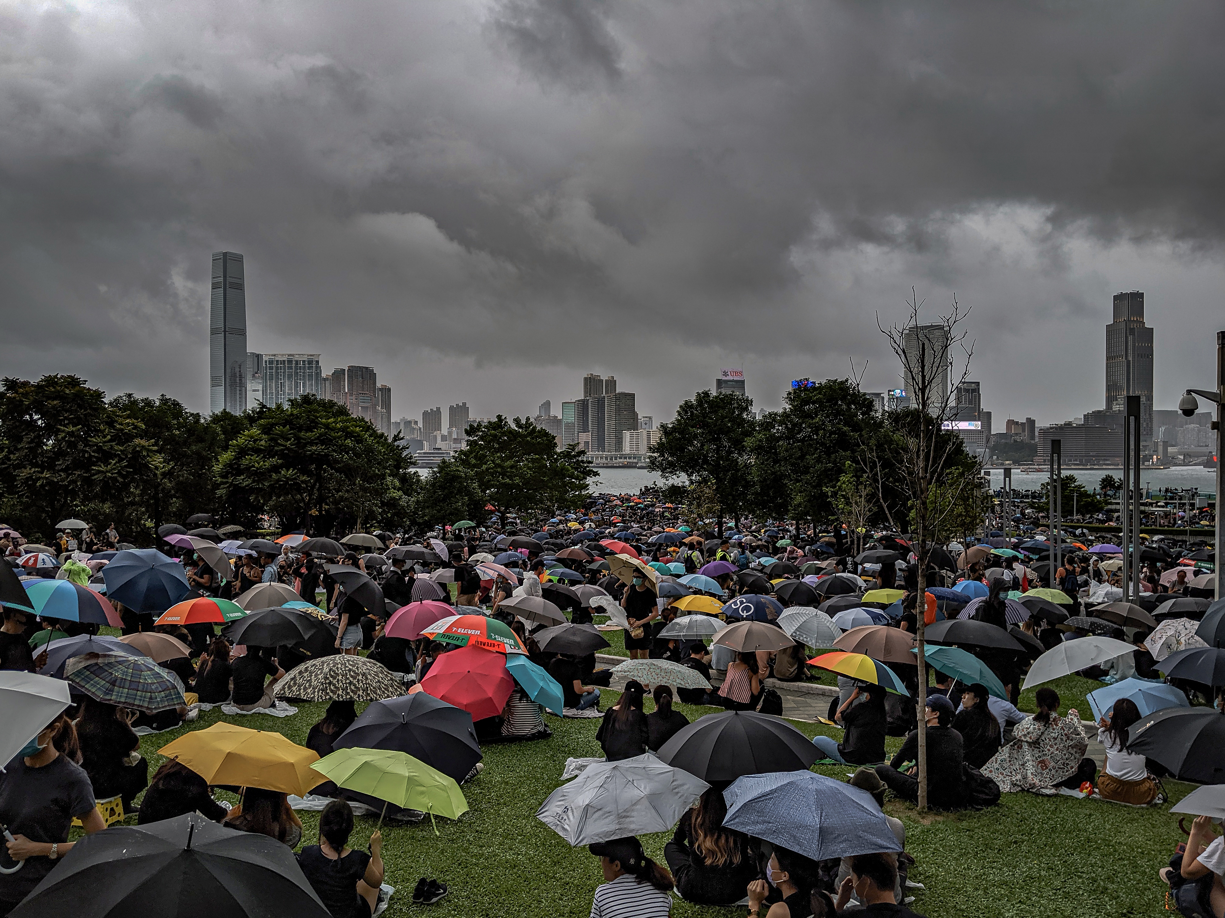 IMG_20190902_180958